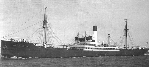 Der Frachter Rio de Janeiro der Hamburg-Süd